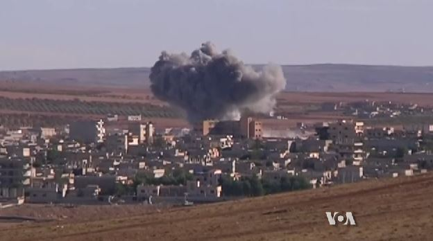 Vue de Kobané, le 20 octobre 2014.